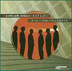 A Banchieri Énekegyüttes 2011-es CD-lemeze